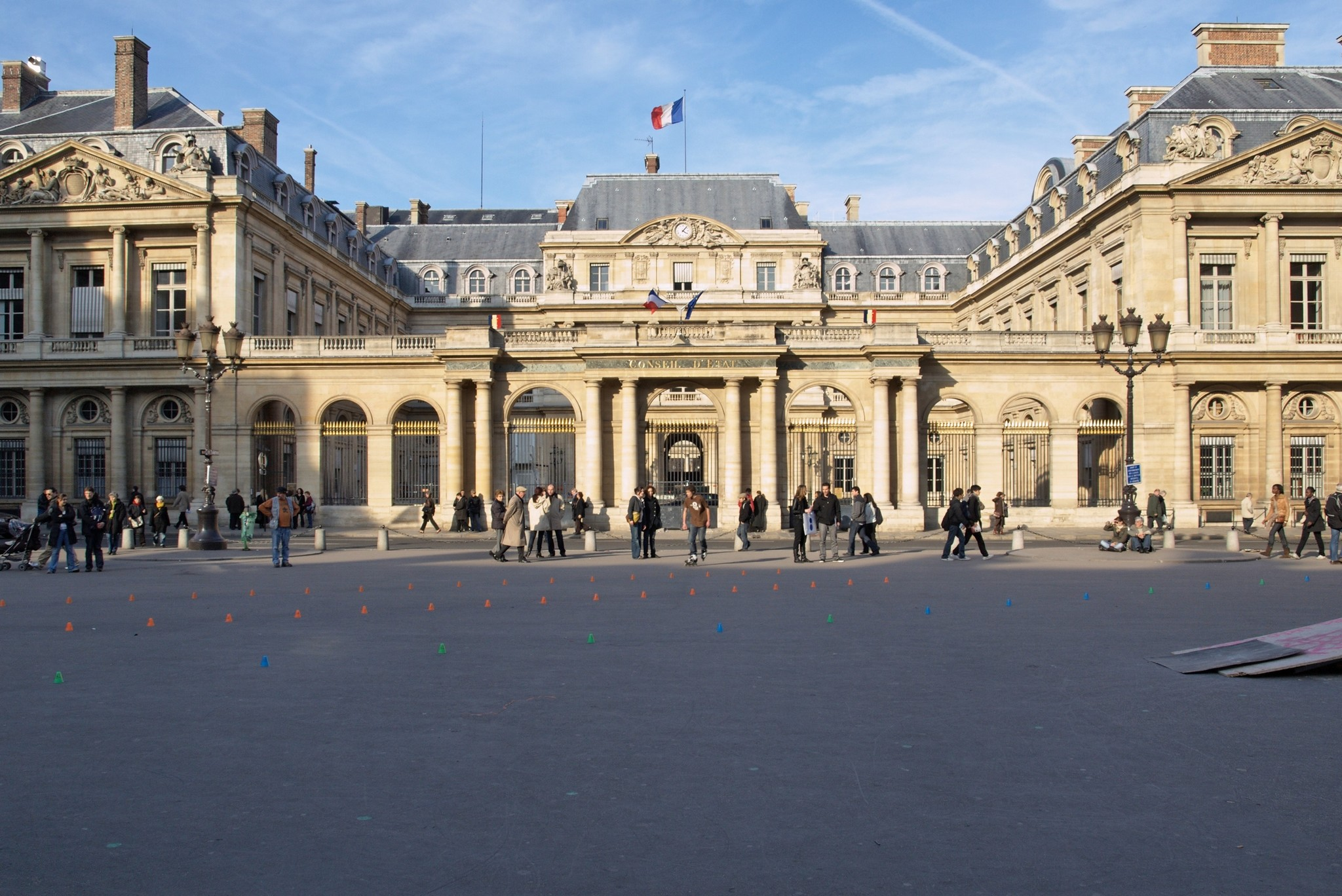 Bâtiment du conseil d'état , place du Palais Royal